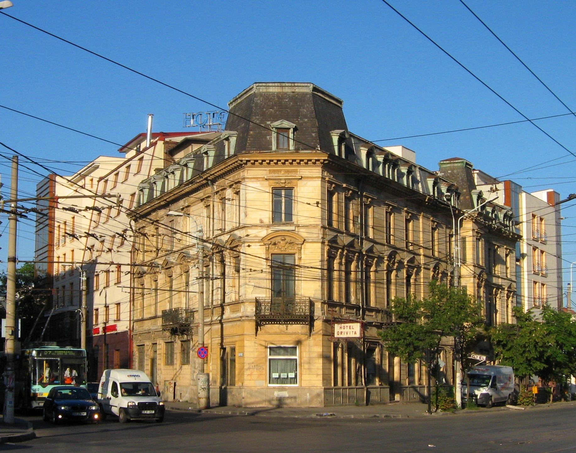 Hotel Grivita, Bucuresti